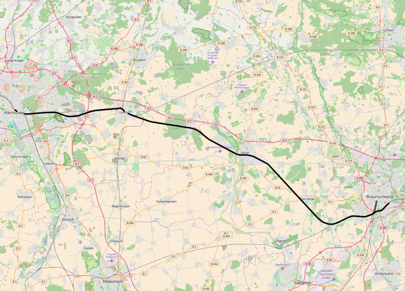 DB 1730, Hannover - Braunschweig